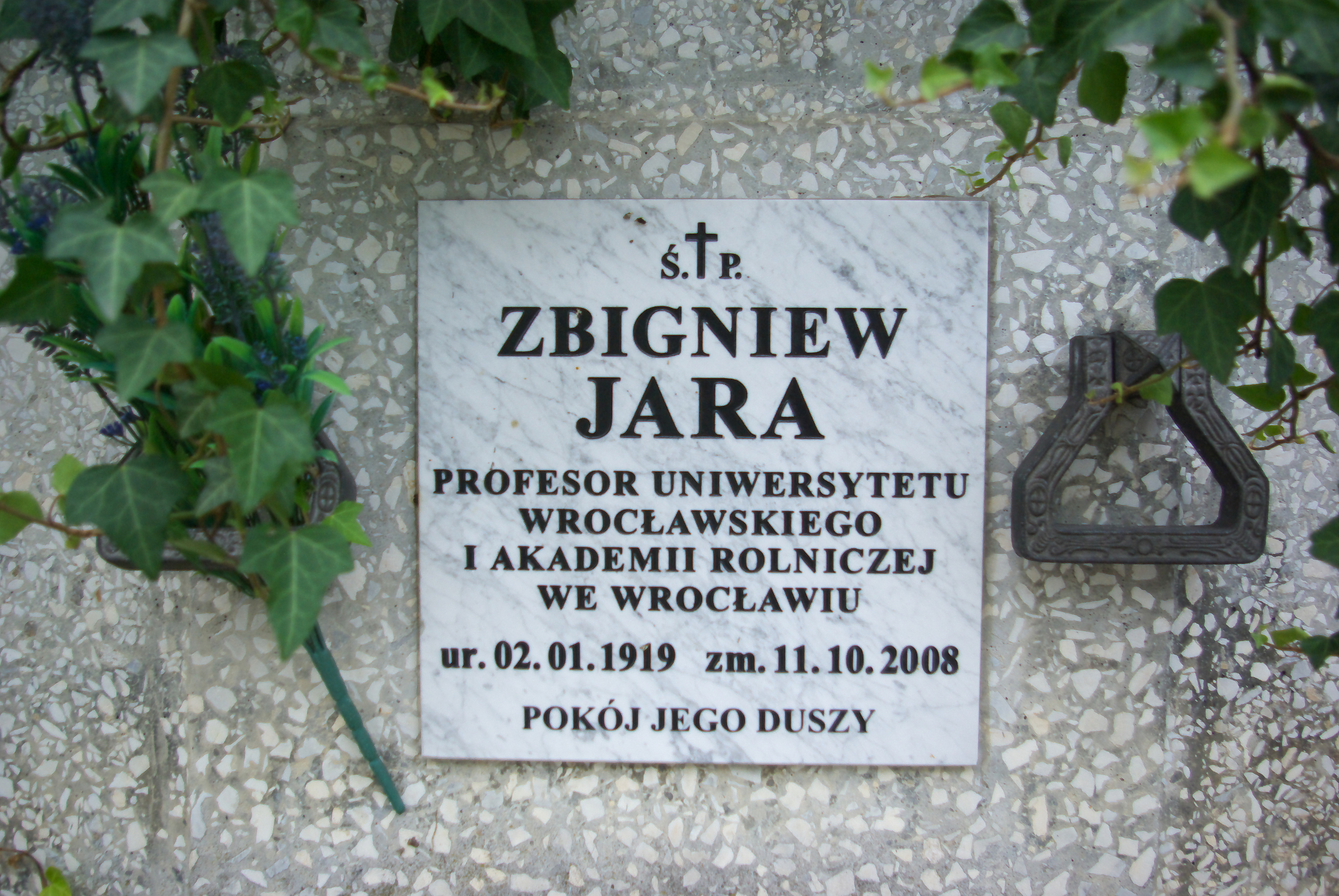 Tabliczka Zbigniew Jara - grobowiec rodziny Jarów w Sanoku